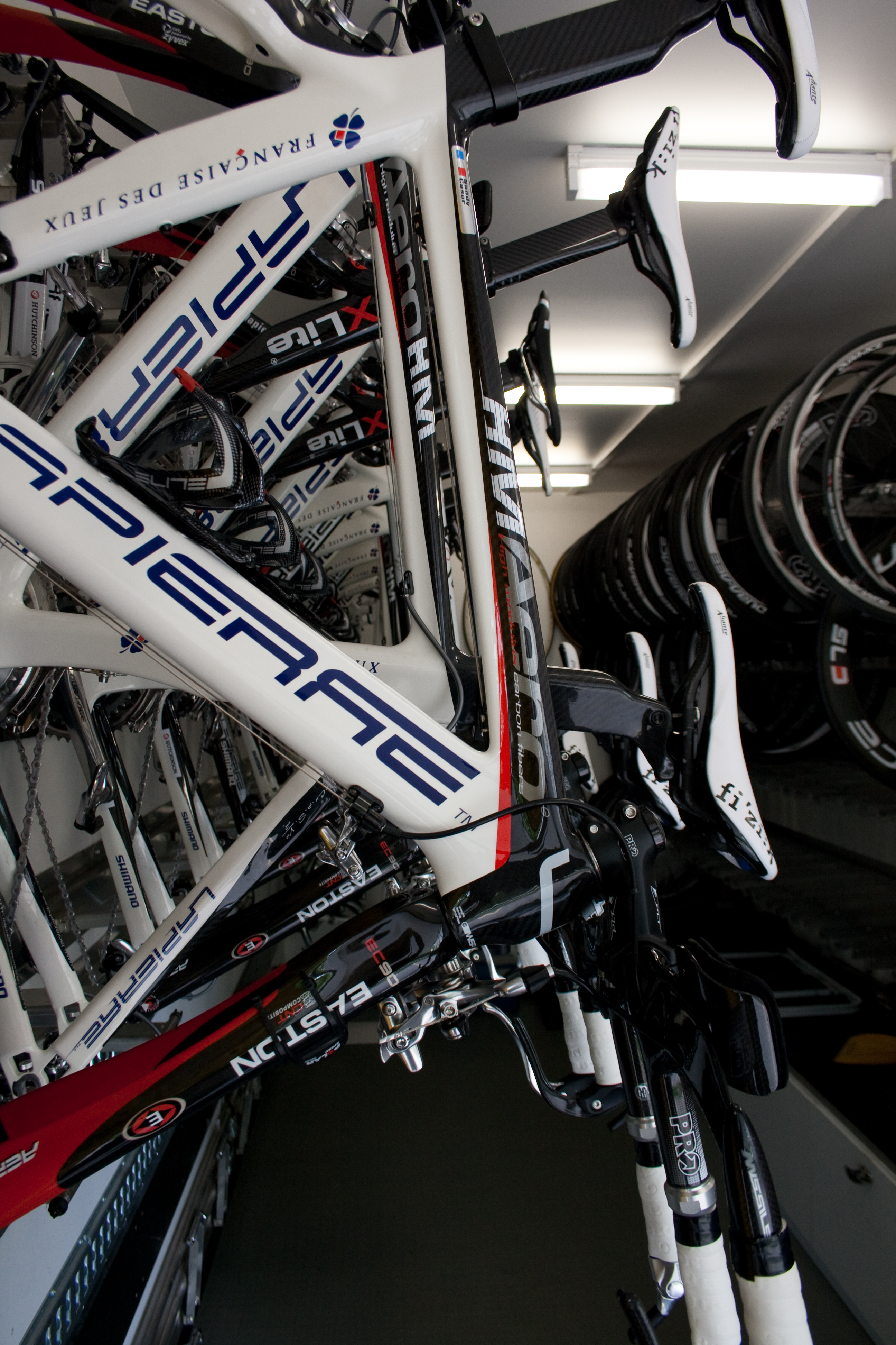 Intérieur du camion de l'équipe cycliste de la Française des jeux.